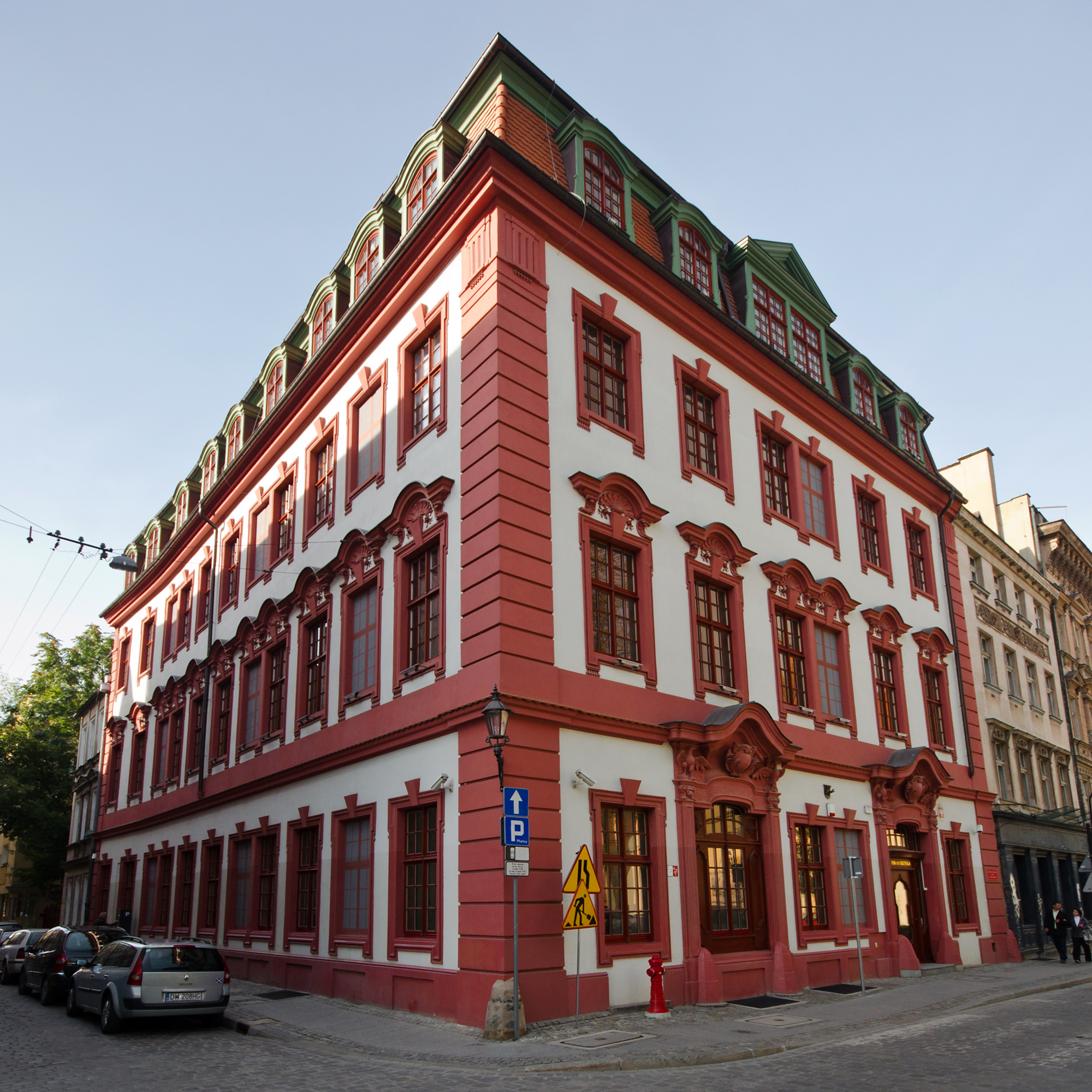 Wrocław Stare Miasto, pl. Nankiera 4 - pałac, obecnie Uniwersytet Wrocławski Instytut Filologii Romańskiej (zabytek nr A/2781/249)